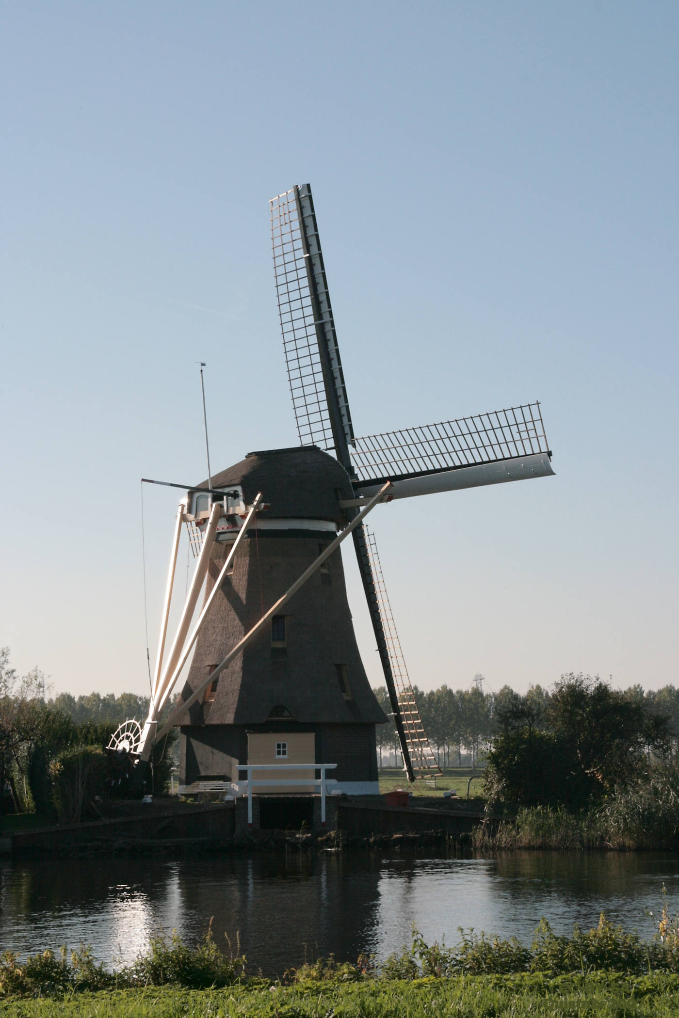 Gatenmolen in Nigtevecht